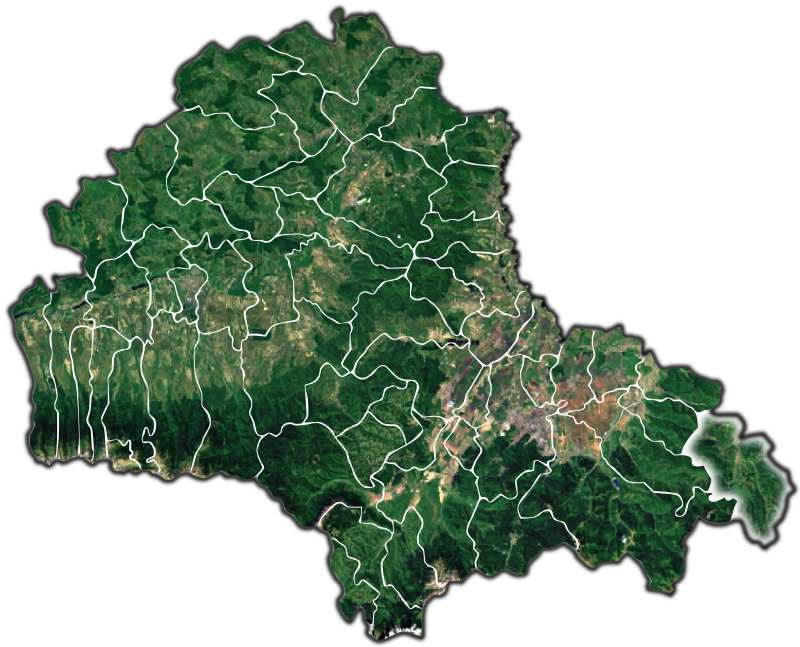 Vama Buzaului jud Brasov